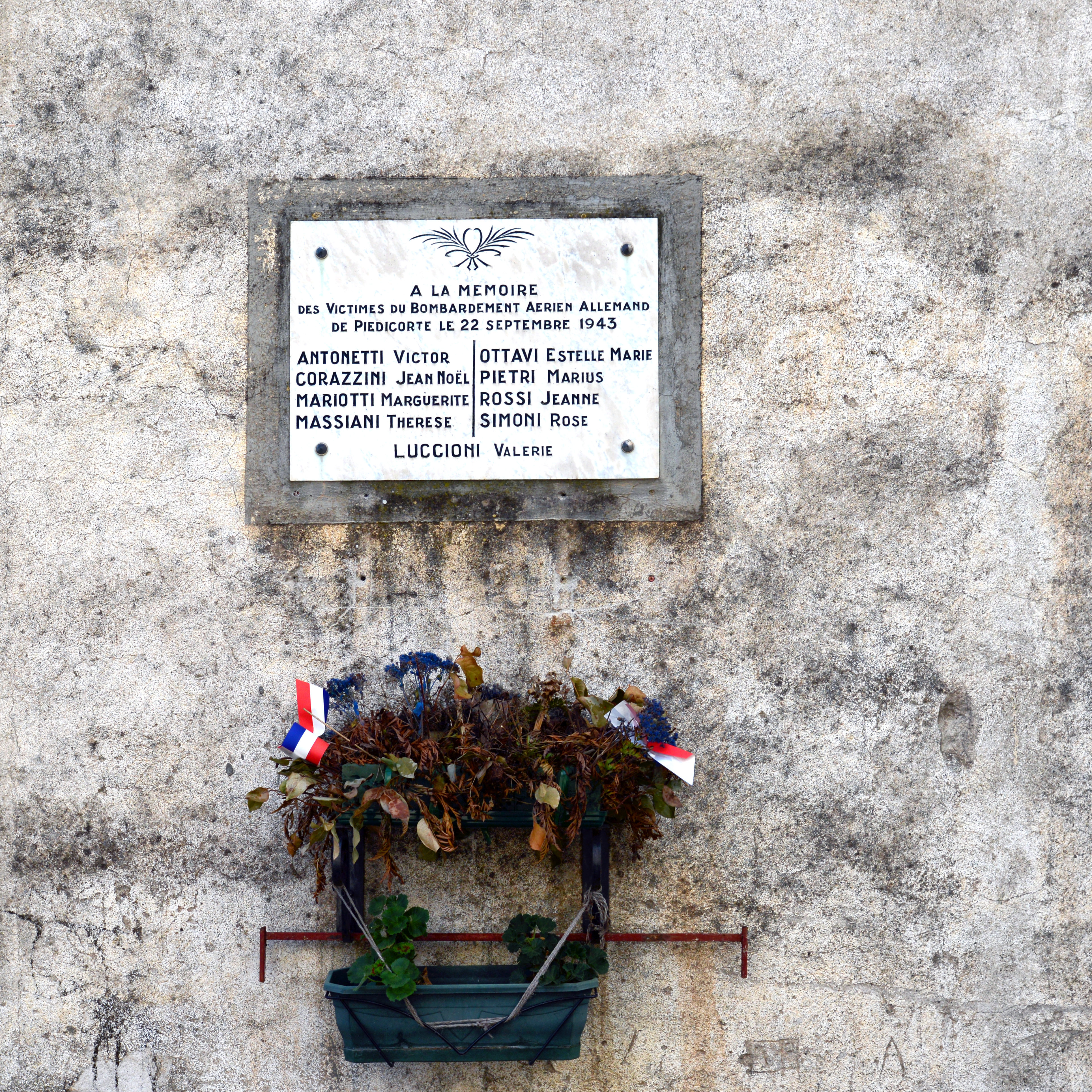 Piedicorte-di-Gaggio, Rogna (Corse) - Plaque commémorative du bombardement du village opéré le 22 septembre 1943 par l'aviation allemande.